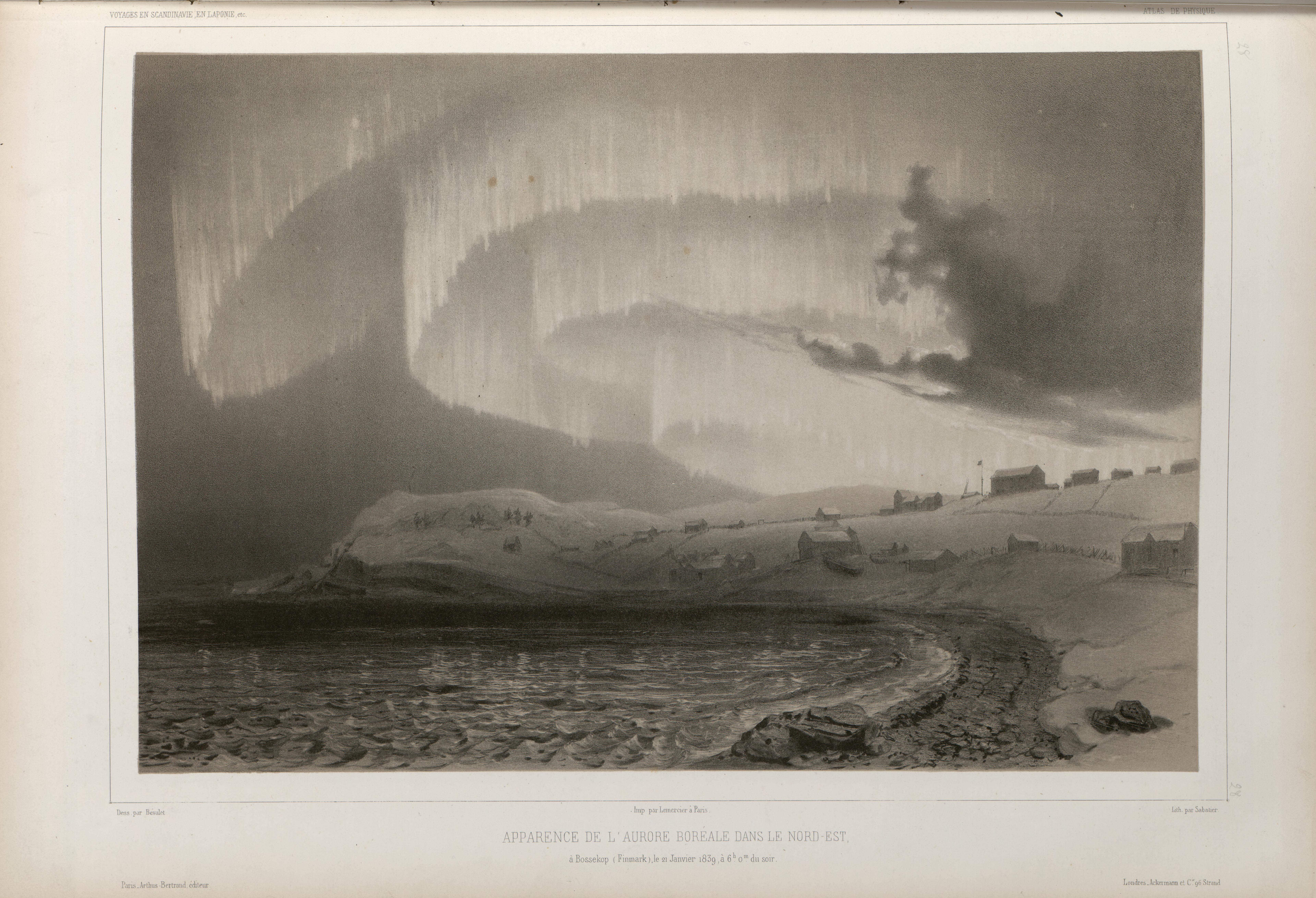 Illustrasjon hentet fra boken "Voyages de la Commission scientifique du Nord, en Scandinavie, en Laponie, au Spitzberg et aux Feröe" av ukjent forfatter og utgitt av Arthus BertrandParis : Arthus Bertrand, 1842-1855 (Paris, 185?)